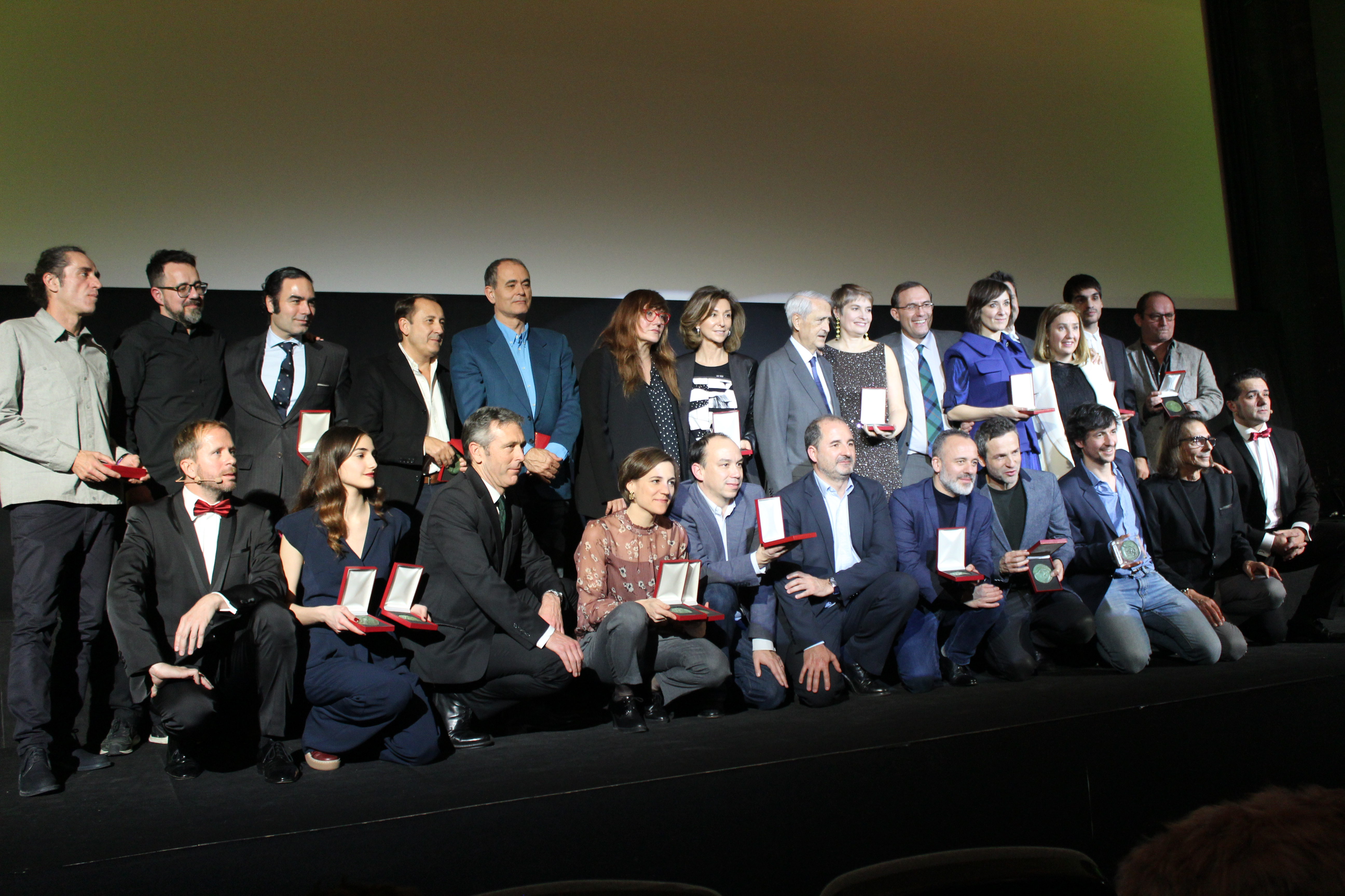 Los ganadores de las medallas del Círculo de Escritores Cinematográficos de 2017.